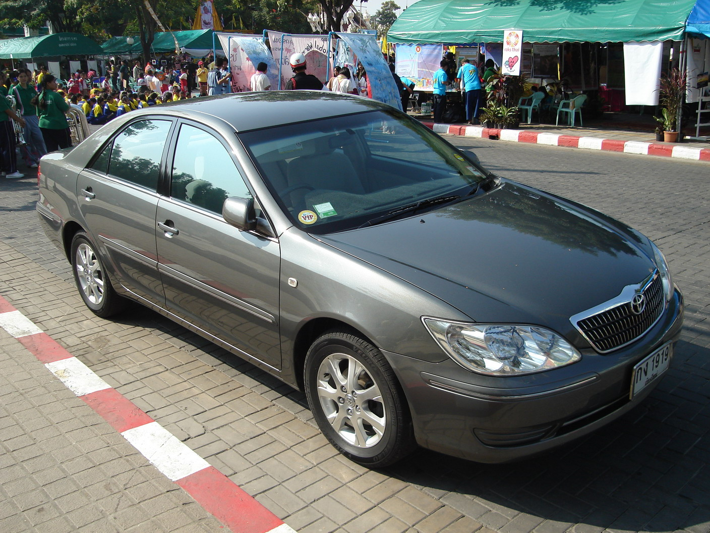 Toyota Camry -- Chiangmai, Thailand